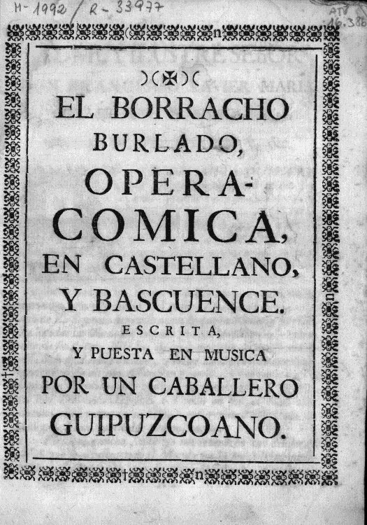 El borracho burlado operetaren jatorrizko azala